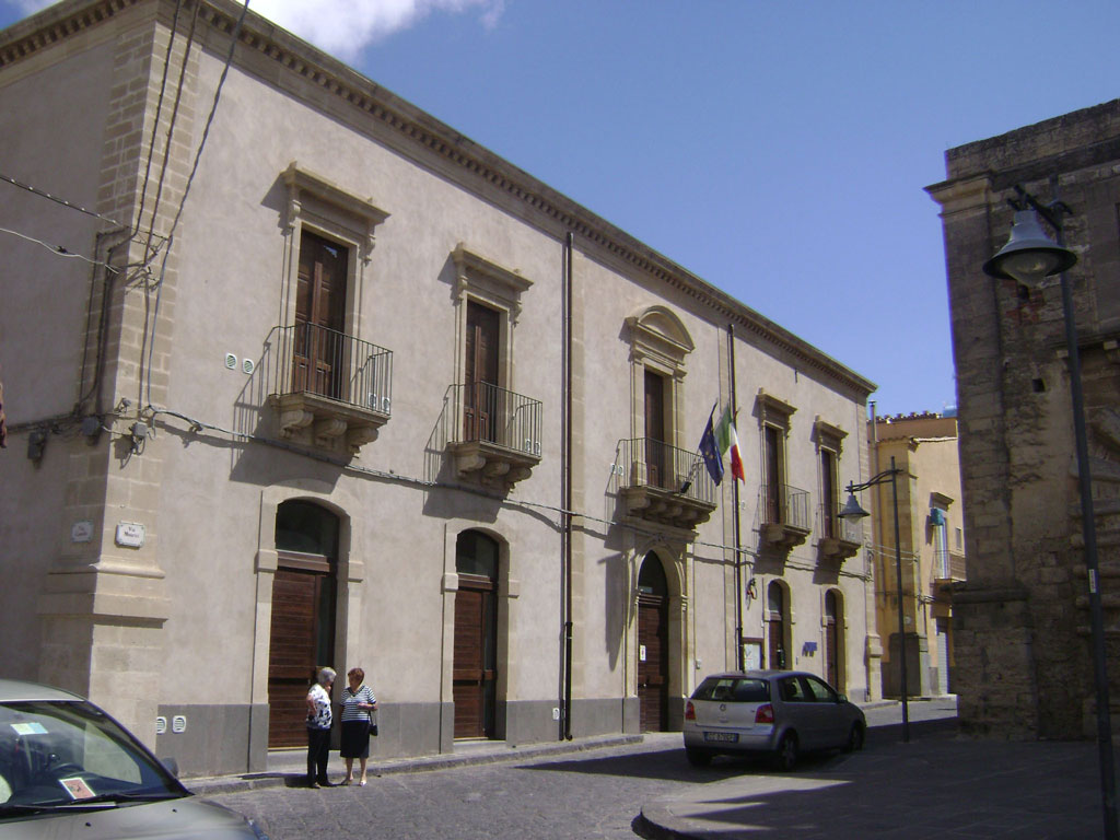 Palazzo Ballarò